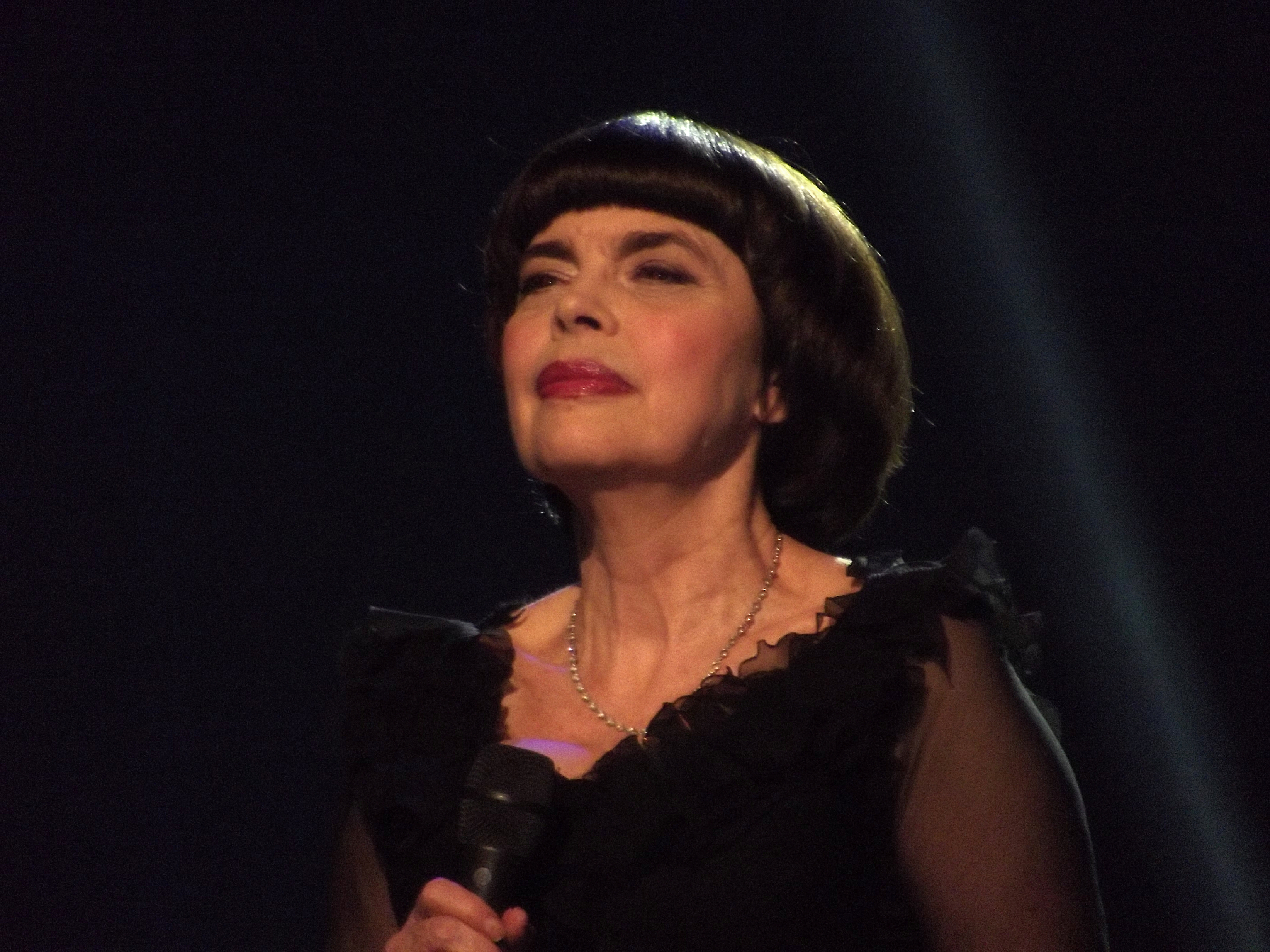 Mireille Mathieu au Théâtre Sébastopol de Lille, le 14 novembre 2014.